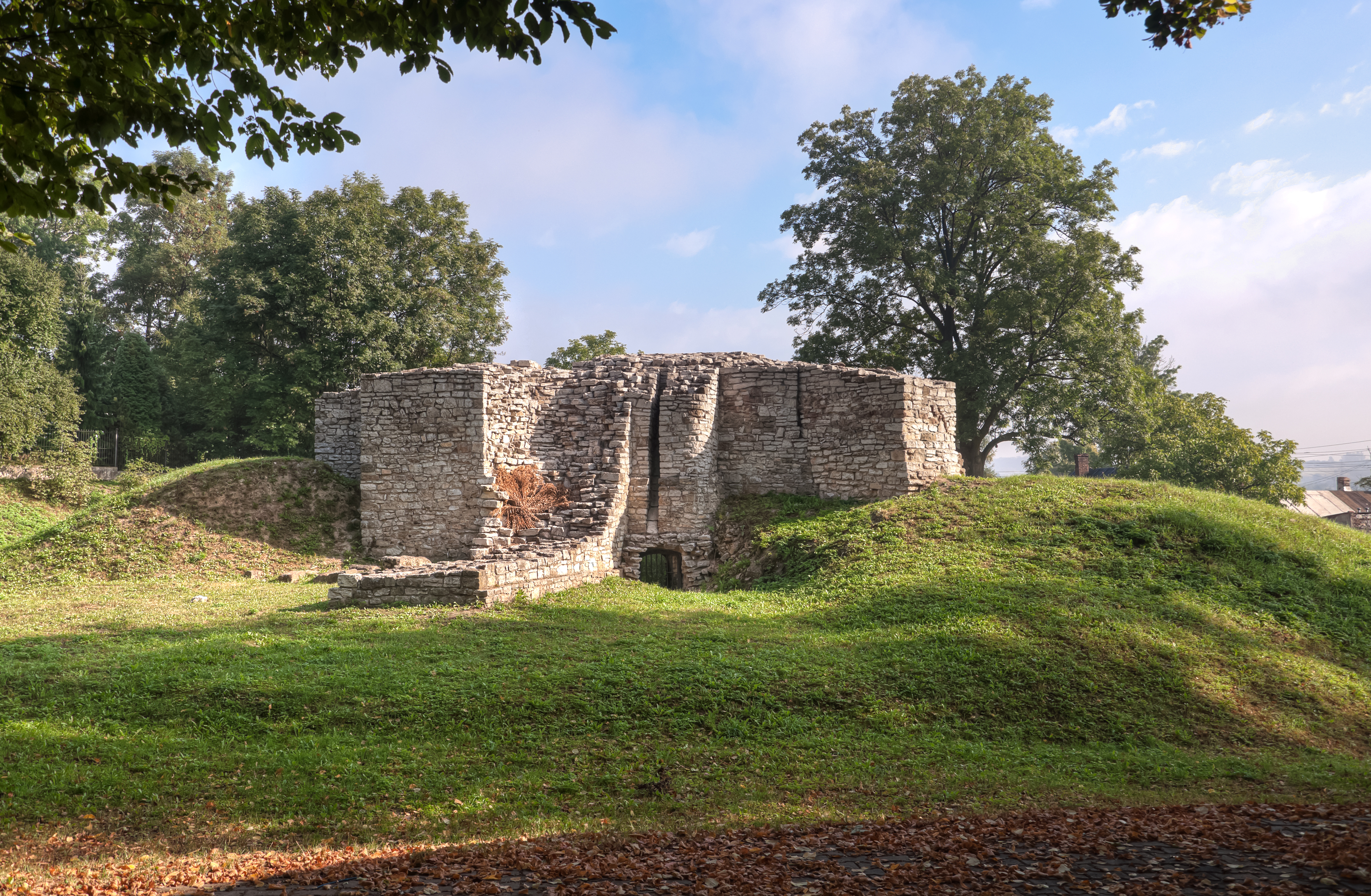 Relikty zamku średniowiecznego w Sławkowie